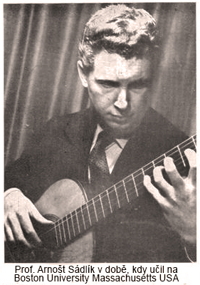 Prof. Arnošt Sádlík v době, kdy učil v USA